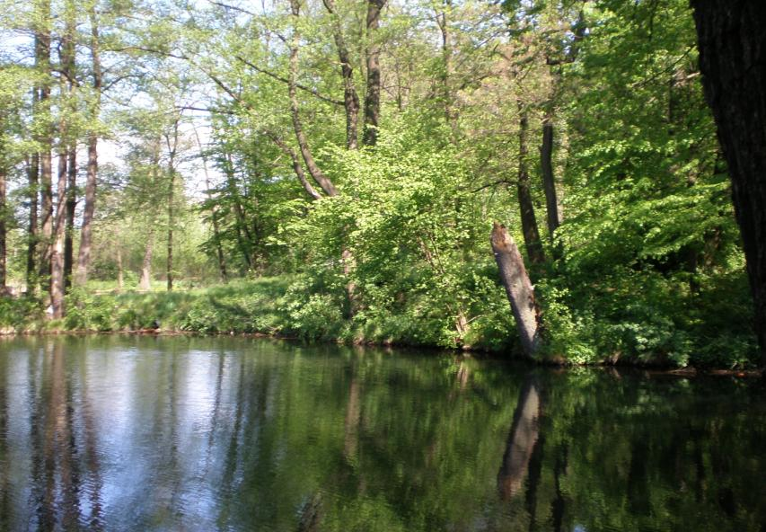 Zdjęcie parku w Zakładzie Niechcickim, założonego przez A. Krugiera.